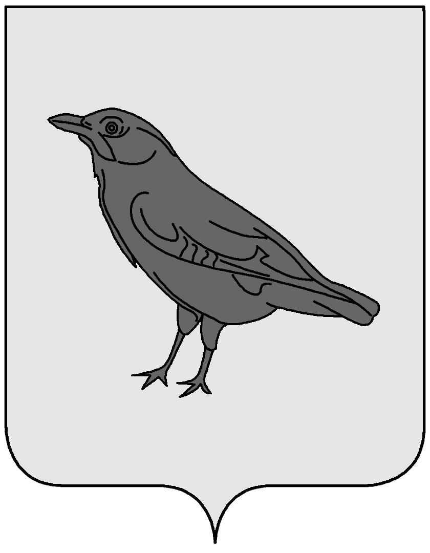 Stemma della famiglia Gazxola